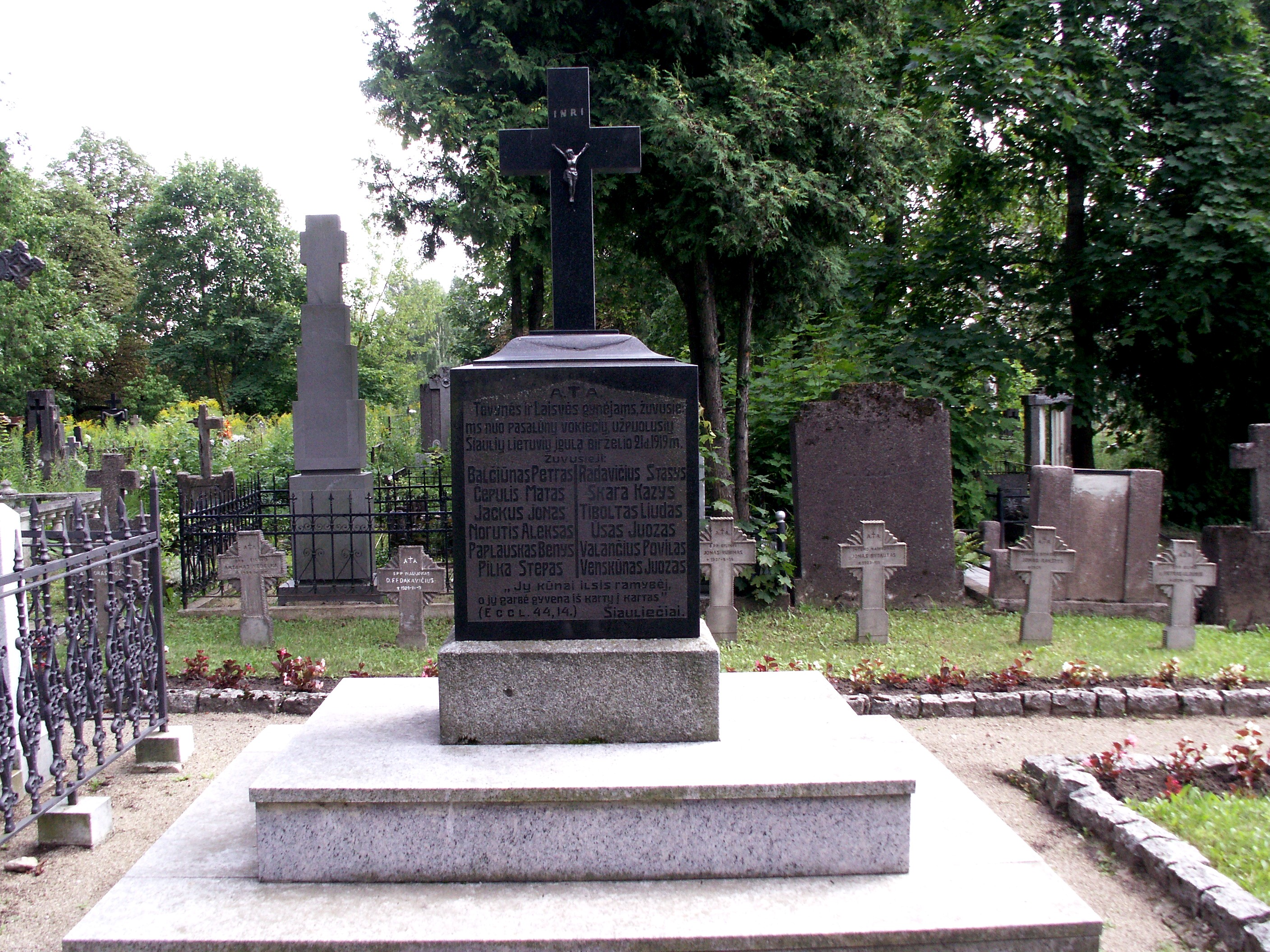 Šiaulių senosios kapinės. Šiaulių įgulos karių, nužudytų klastingai užpuolus vokiečiams 1919 m. birželio 21 d., kapas